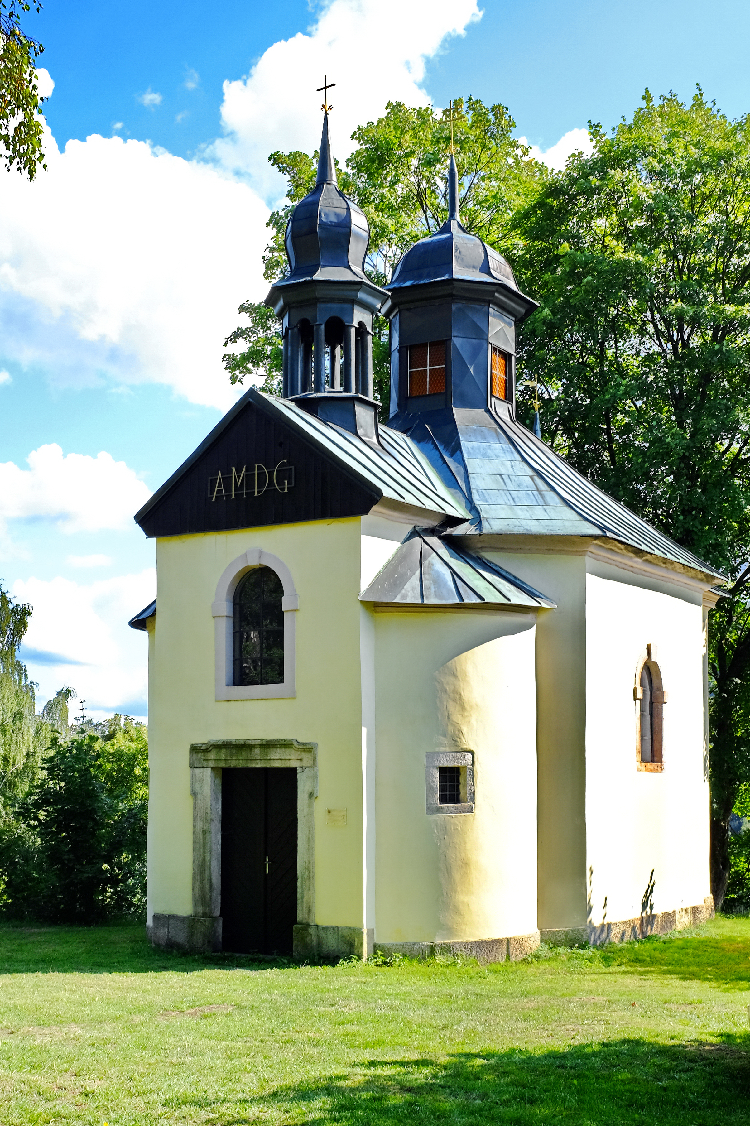 Kaple svatého Jana Nepomuckého, Jánský vrch, severní svah údolí, nad městem, st. 392, Jáchymov.